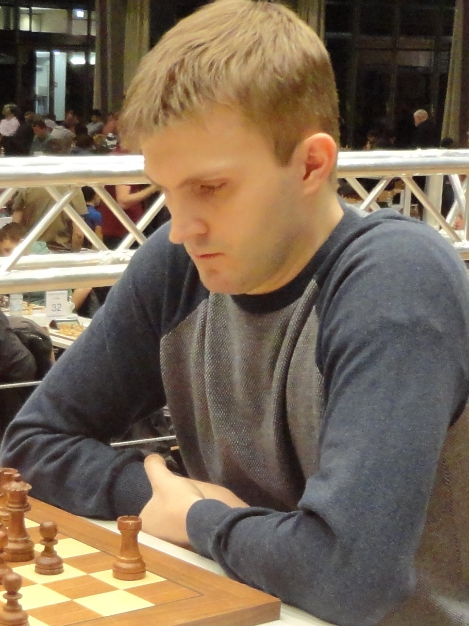 Nikita Vitiugov, Grenke Chess Open 2016 in Karlsruhe.